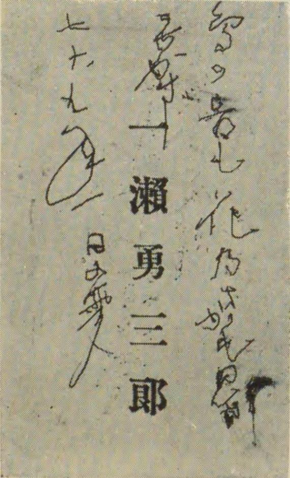 一瀬勇三郎の辞世